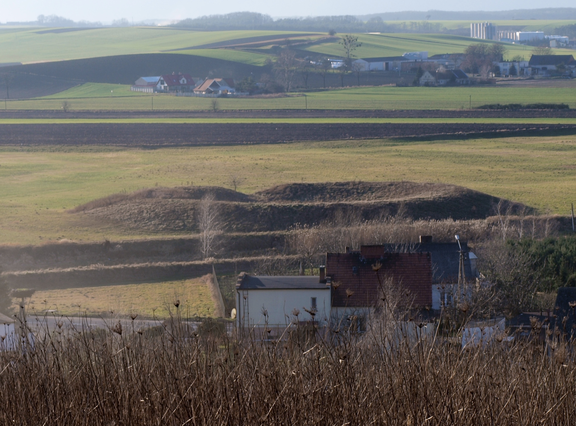 Grodzisko wklęsłe na południowym brzegu kanału Obry